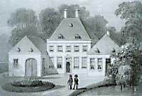 Steendruk naar een prent van Von Geusau van het oude Zionsburg in de eerste helft van de 19e eeuw. (Prent uit de fotocollectie van het streekarchief Langs Aa en Dommel, gescand uit het boek 'Vught onvoltooid verleden deel 8.)